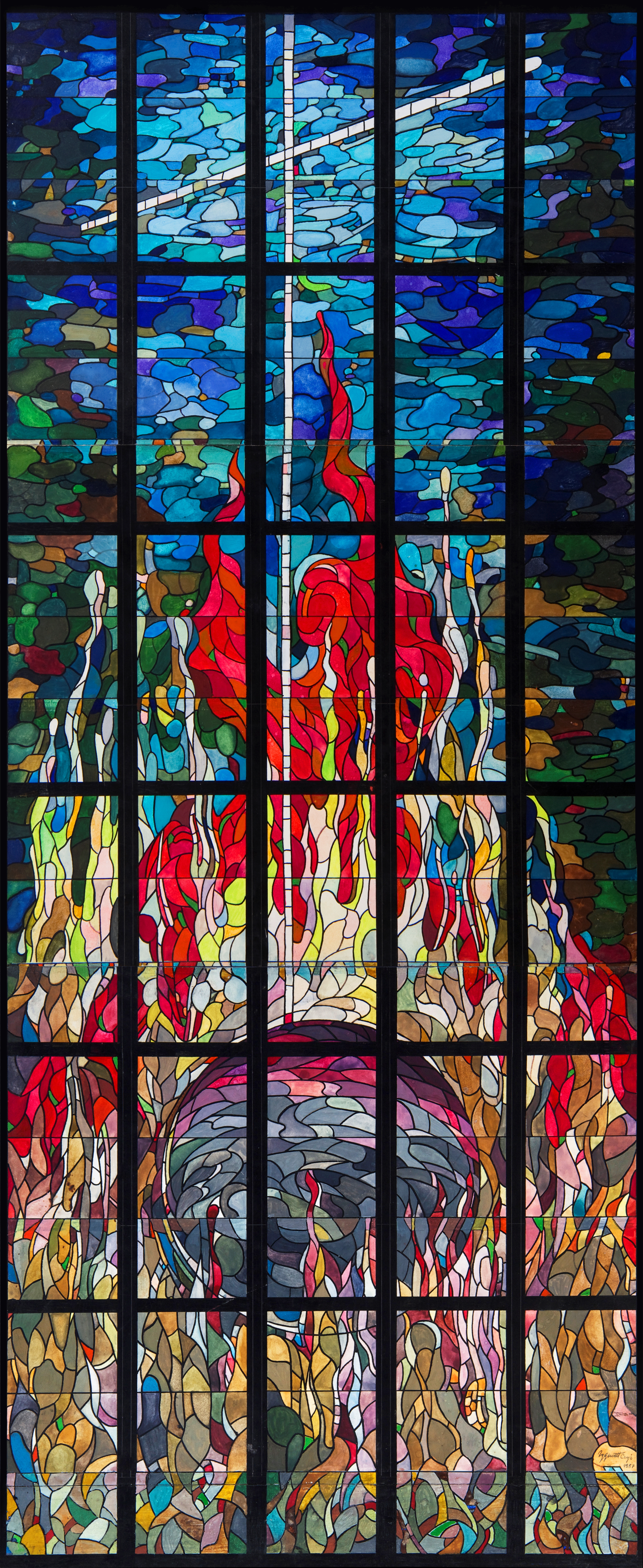 Jeden z witraży w Katedrze Najświętszego Serca Pana Jezusa w Rzeszowie, zaprojektowany przez art. plast. Zygmunta Czyża